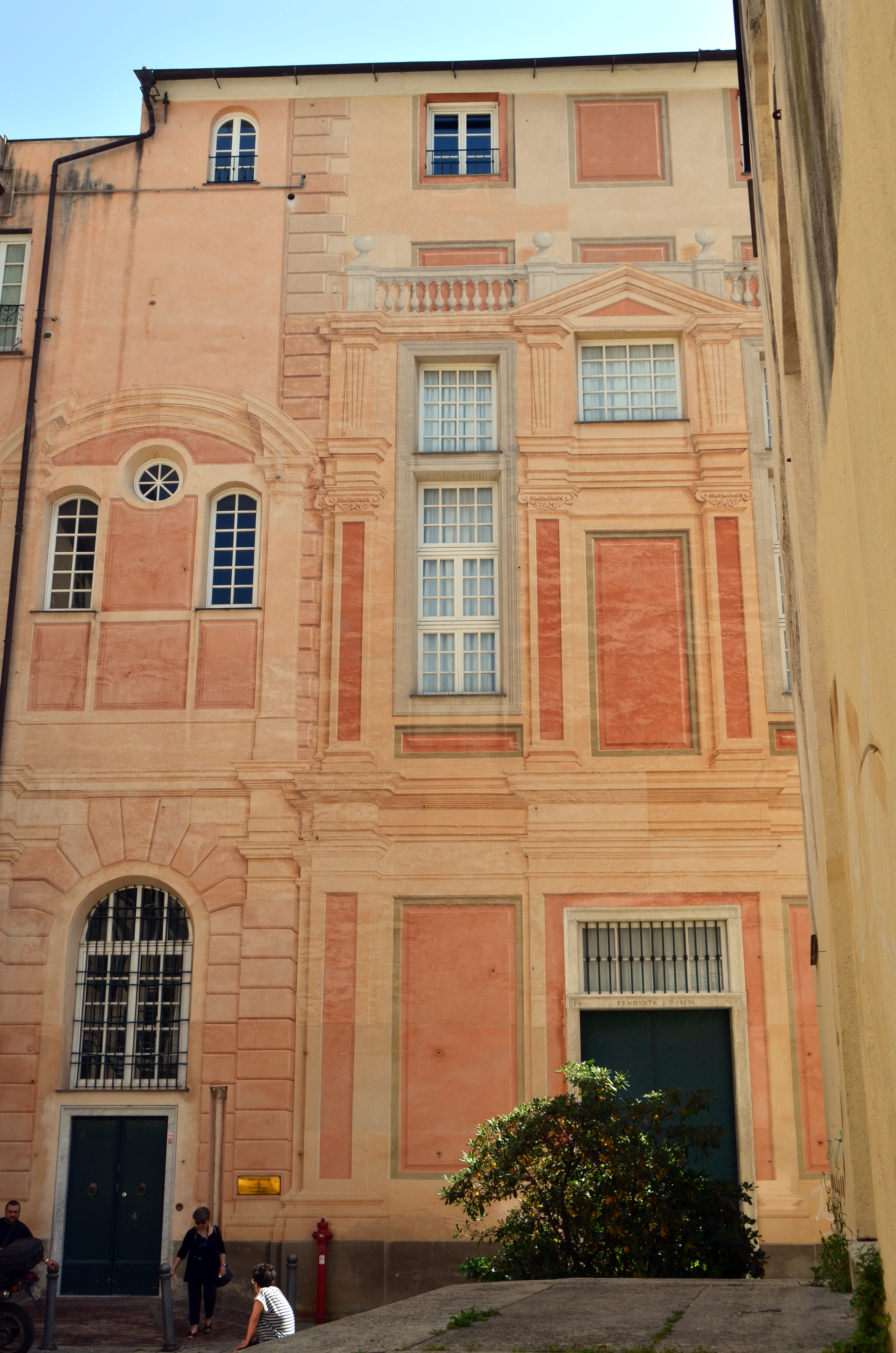 Complesso della Fondazione Paganini nei pressi dell'ex chiesa di Santa Maria in Passione, Genova, Liguria, Italia